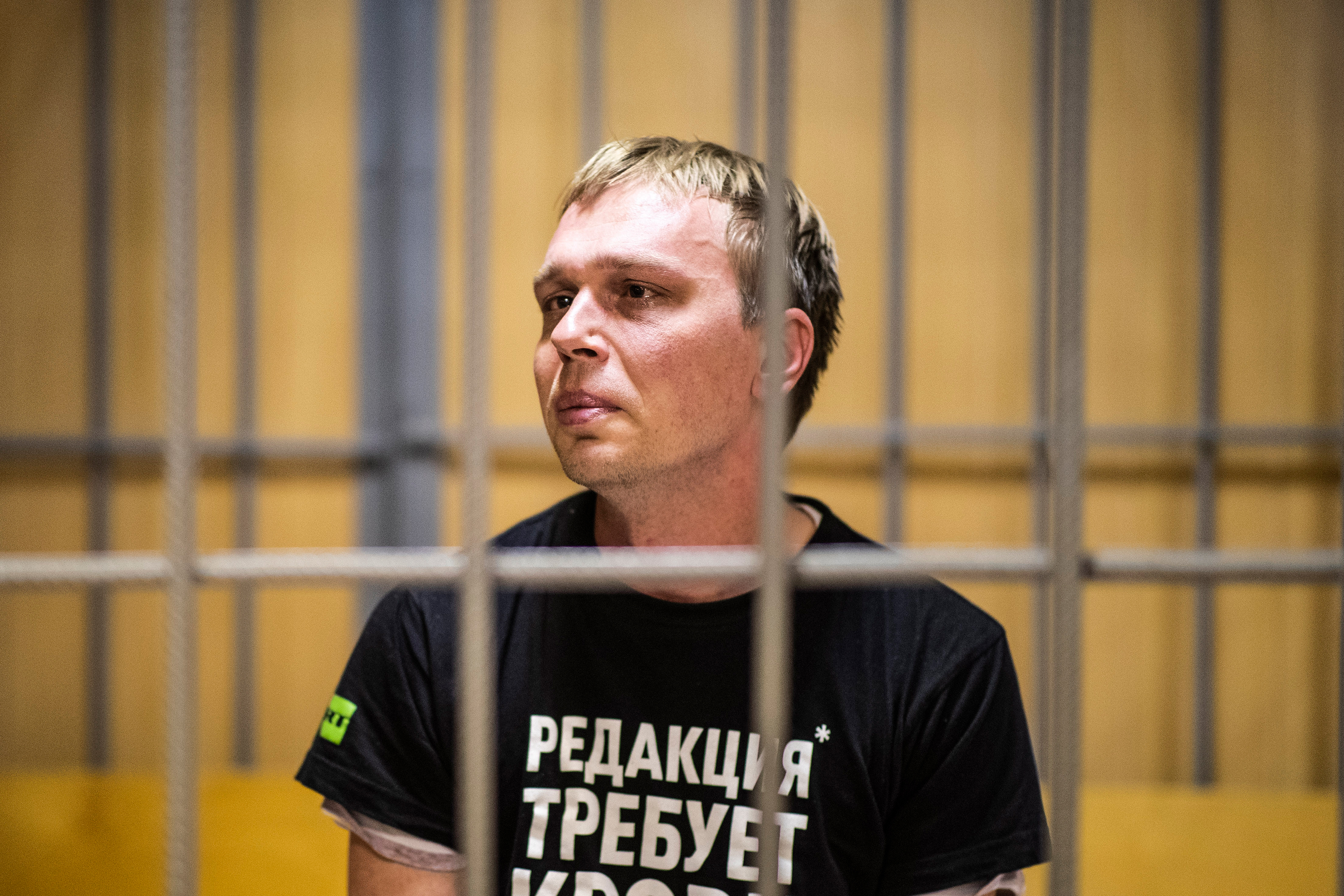 Иван Голунов в зале Никитинского суда. Фото: Евгений Фельдман.